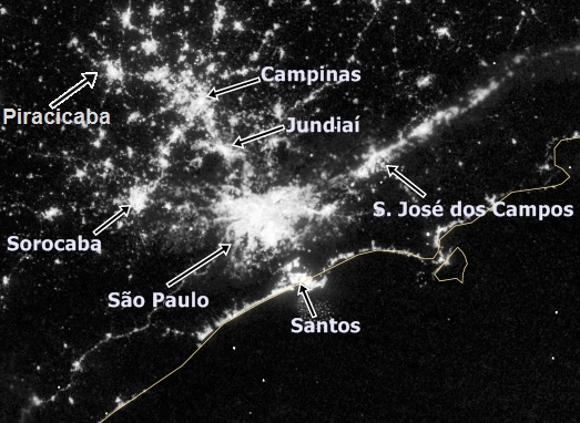 Imagem de satélite do Complexo Metropolitano Estendido, em São Paulo, à noite.